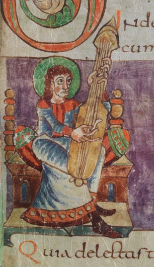 Stuttgarter Psalter - Cod.bibl.fol.23: Detail der Miniatur auf 108r. Medieval cythara from Stuttgart Psalter